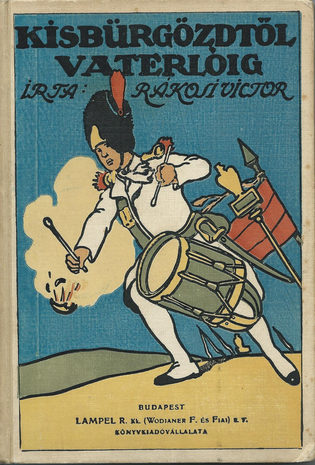 Rákosi Viktor: Kisbürgözdtől Vaterlóig c. 1913-ban megjelent könyvének borítója